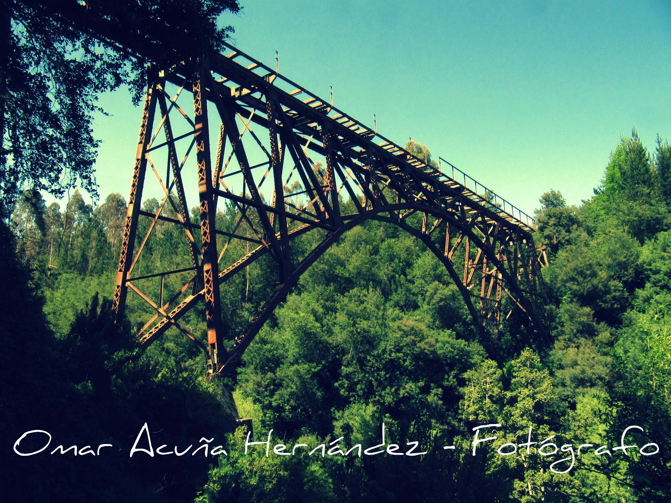 Puente ferroviario sobre la profunda quebrada del río Quino, en el desaparecido subramal Quino a Galvarino.